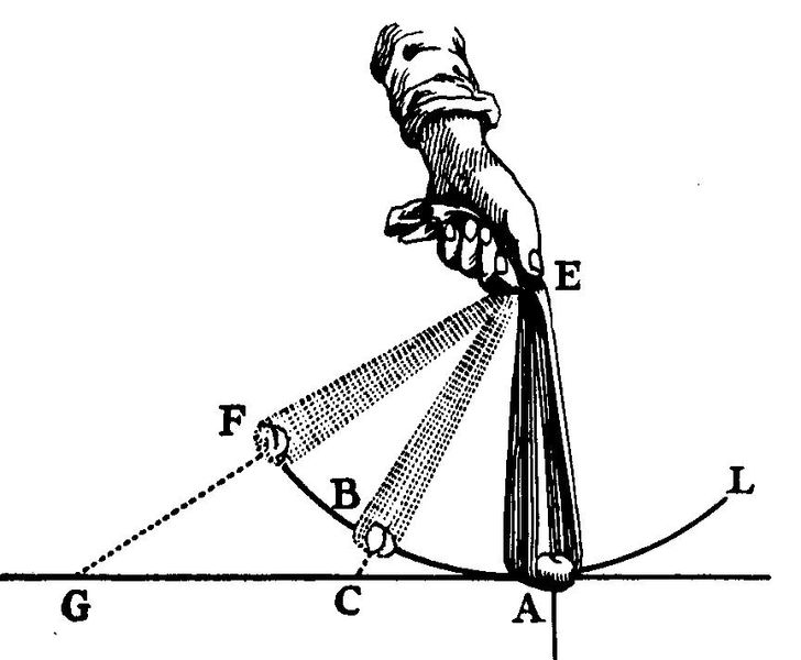 Illustration de Descartes